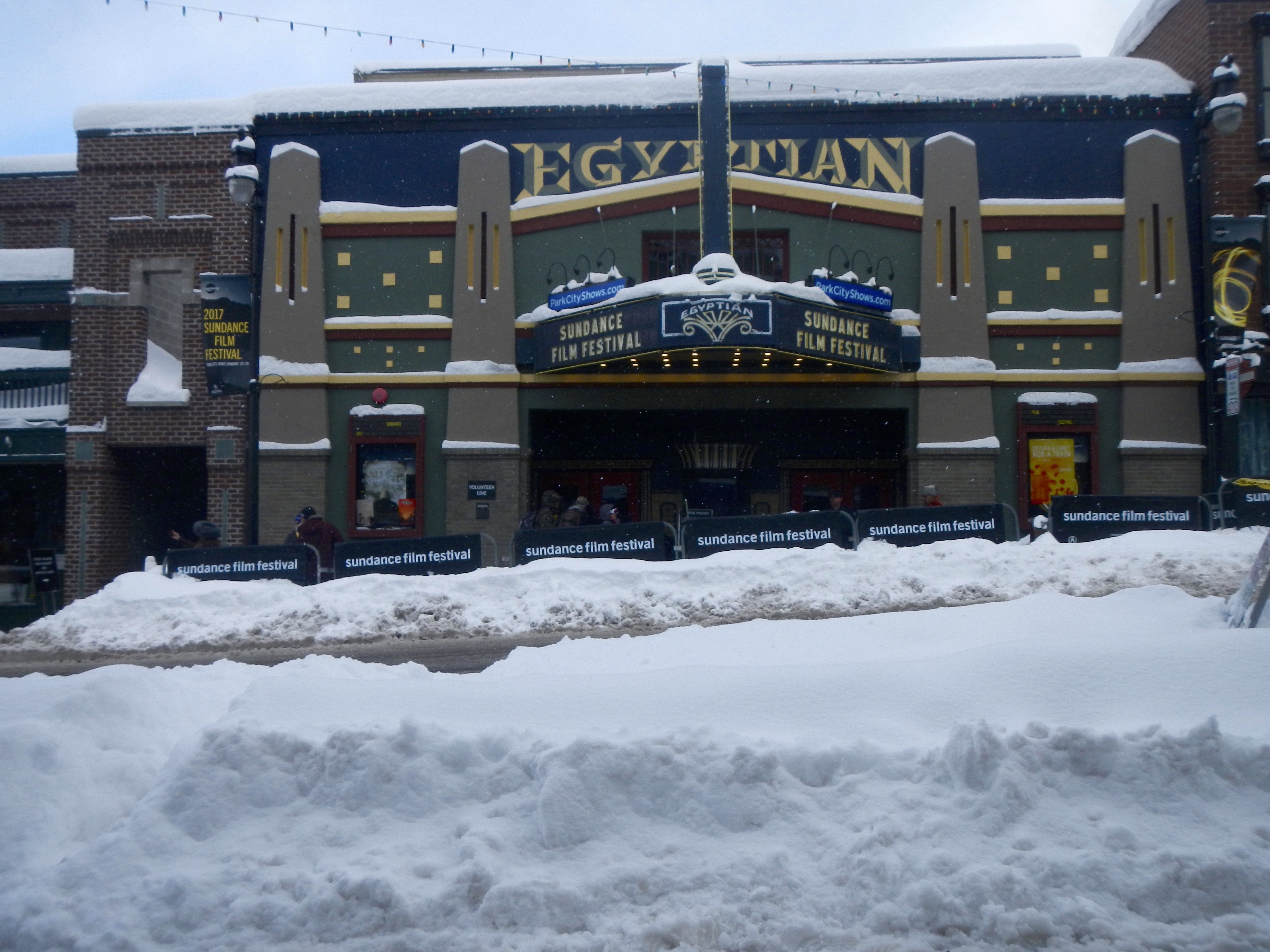 Sundance2017 - 114